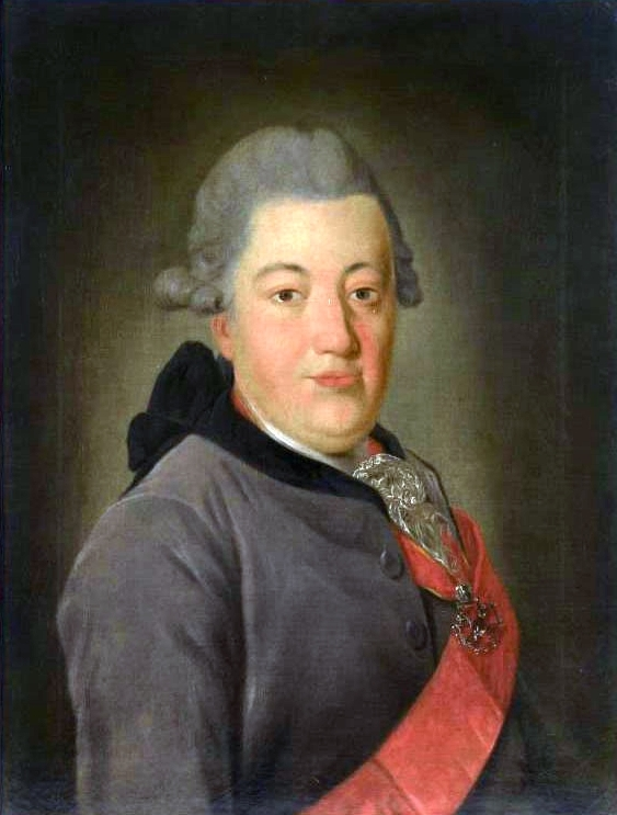 Дмитрий Васильевич Волков (1727—1785)